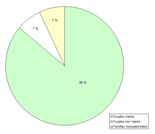 Composition des familles de Gladstone (Manitoba, Canada).